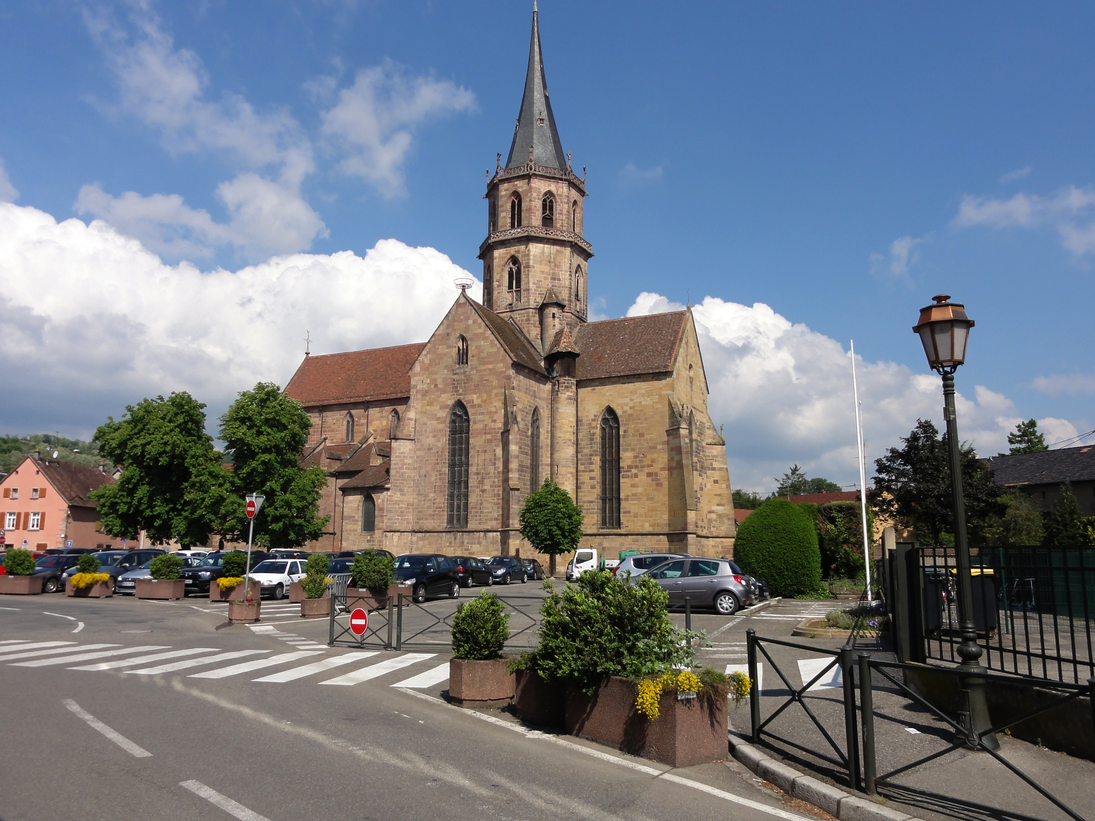 Alsace, Église Saint-Maurice de Soultz-Haut-Rhin (PA00085681, IA00111946).